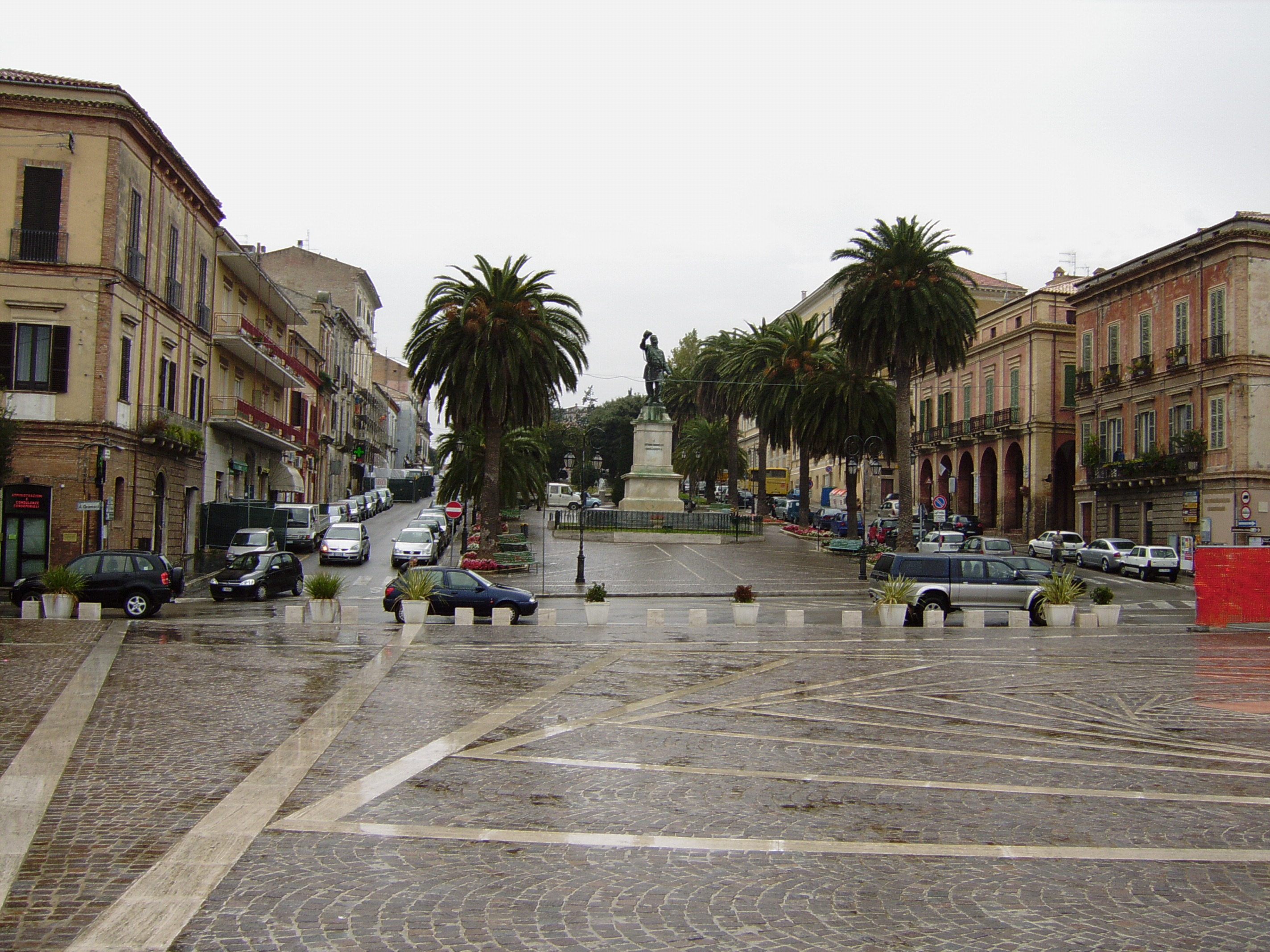 Piazza della Libertà, Giulianova Paese